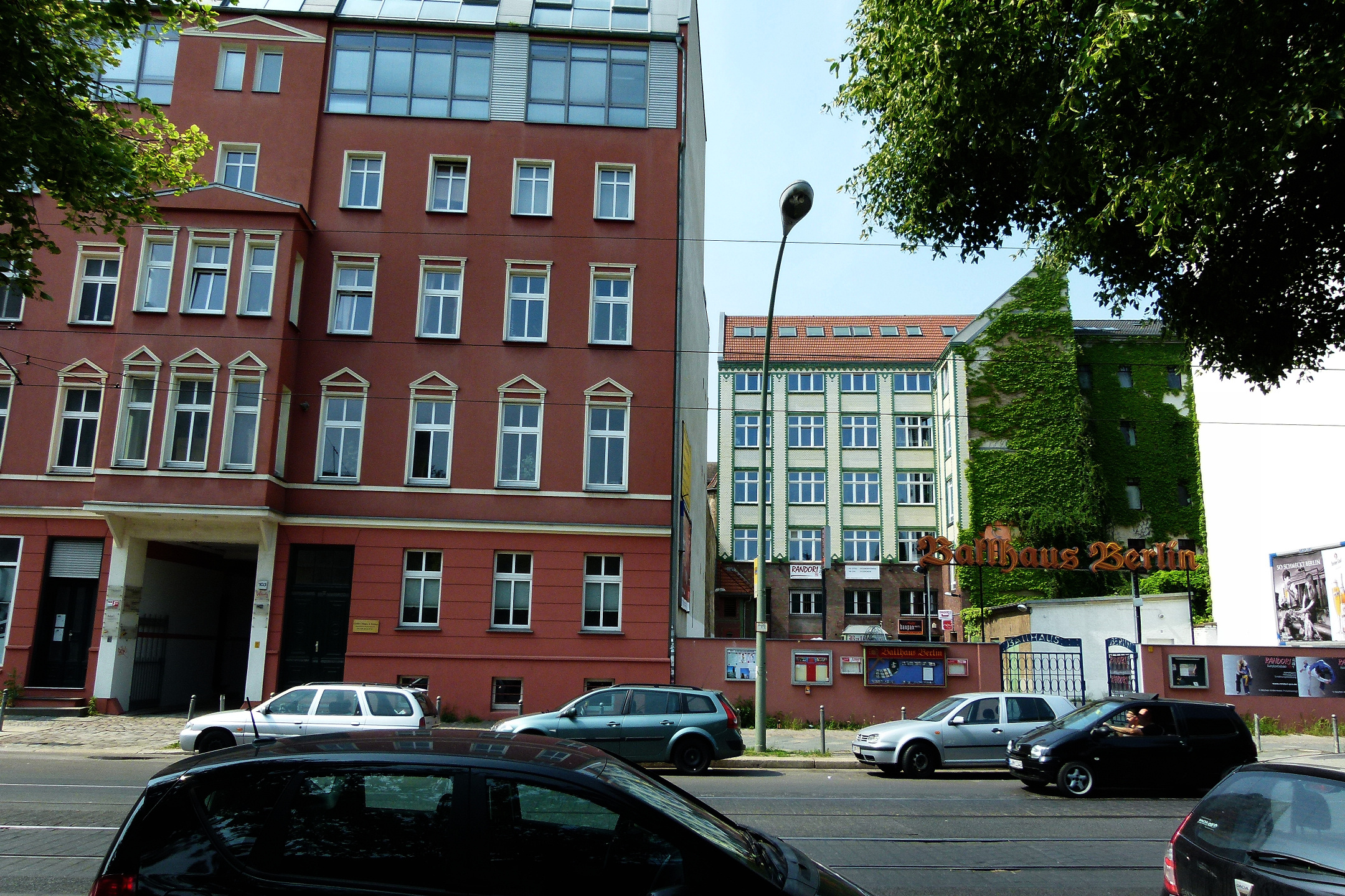 Die Häuser Chausseestraße Nr.103 und 102 mit 'Ballhaus Berlin'. Foto 2011